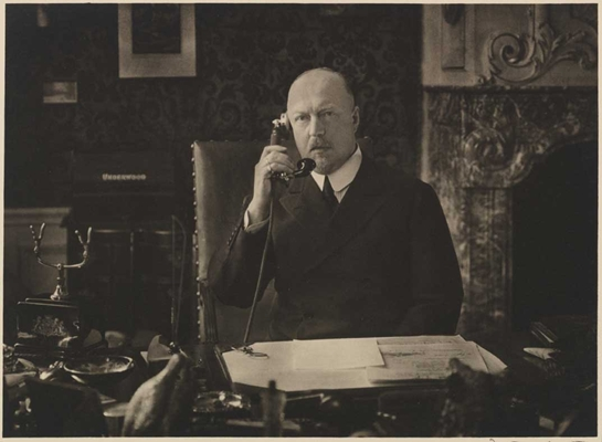 Prins Hendrik, ca 1930/ Franz Ziegler had een goede band met Prins Hendrik. Een van de maatschappelijke functies van de Prins was het voorzitterschap van het Nederlandse Rode Kruis. Dit portret toont de Prins aan zijn bureau in het hoofdkantoor van die instelling. Toen Hendrik in 1934 overleed, werd Ziegler uitgenodigd de begrafenis bij te wonen.